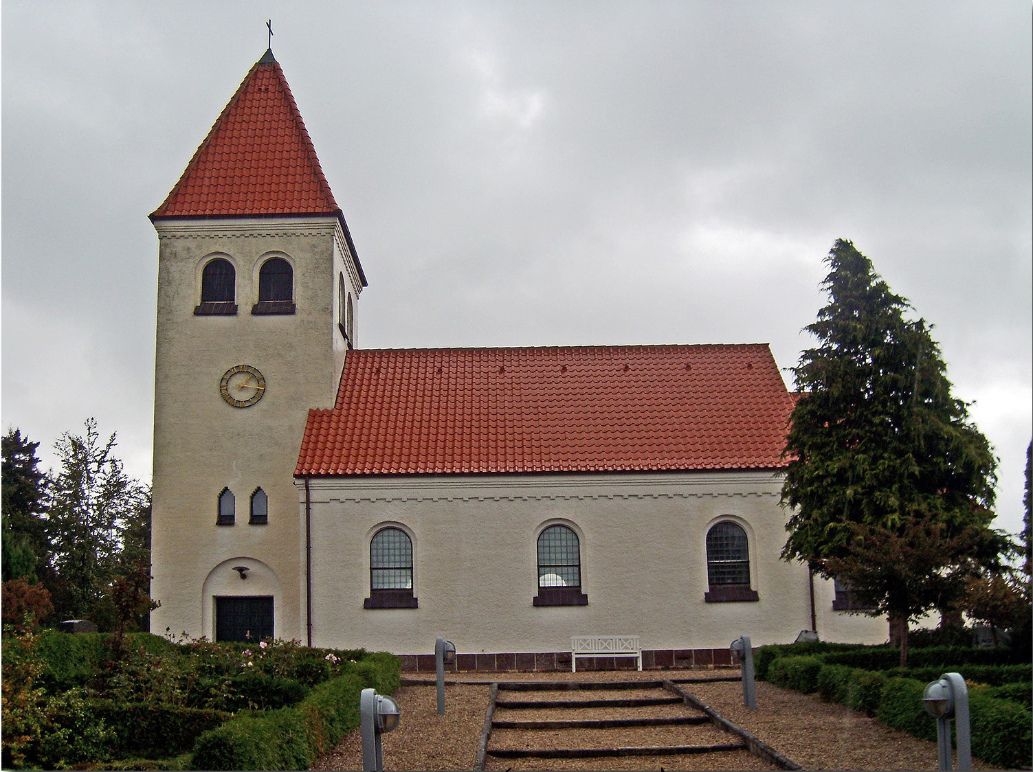 fra syd